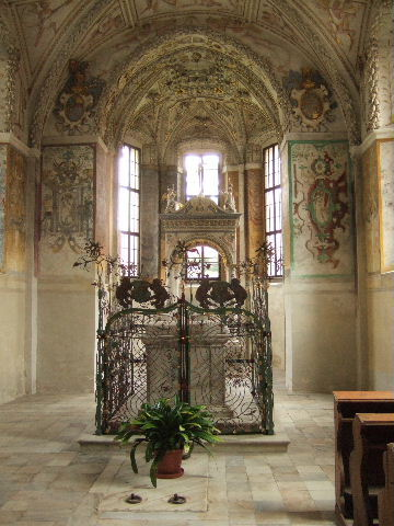 Telč: Schlosskapelle (2009)